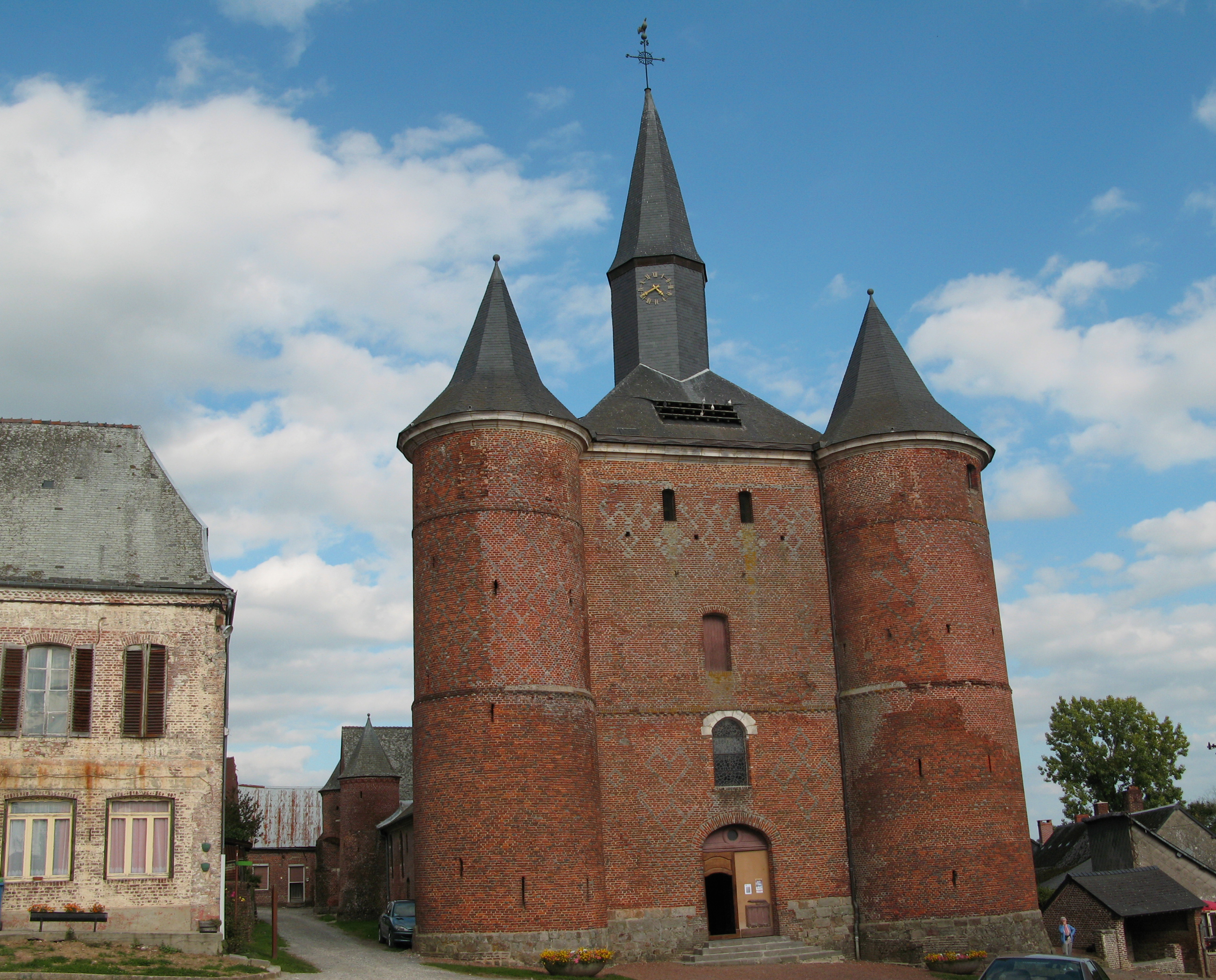 Plomion (Aisne, France) - L'église fortifiée et le lavoir, en bas à droite.